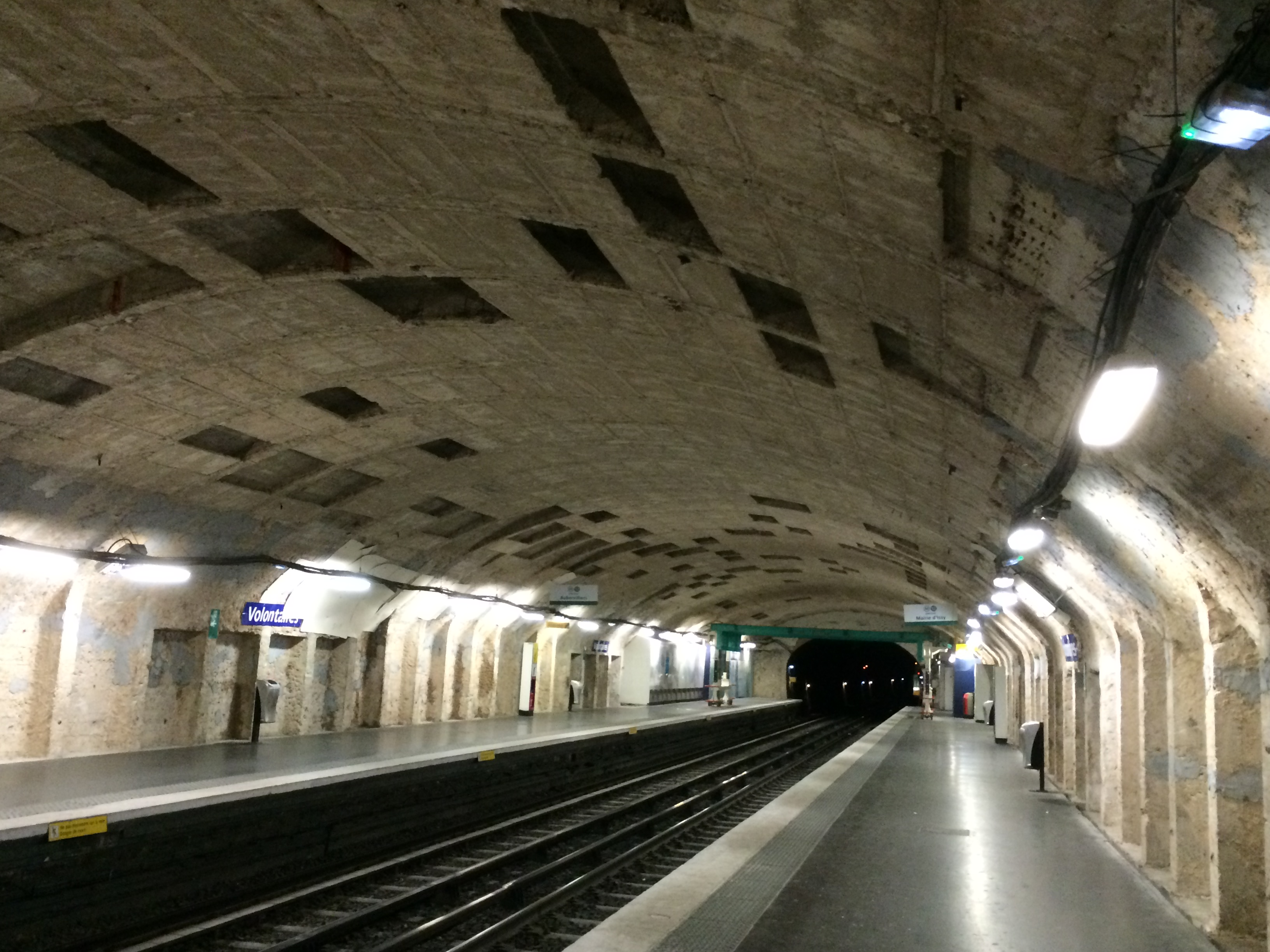 La station Volontaires du métro de Paris en travaux en 2016